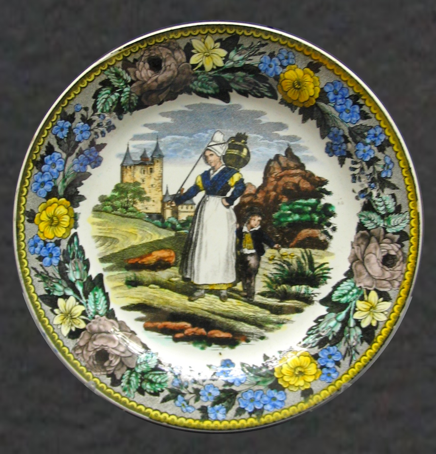 Assiette imprimée à décor rehaussé de couleurs. Choisy-le-Roi, fin XIXe siècle. Musée de la céramique de Rouen.